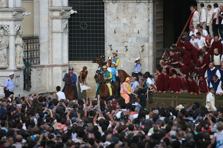 Jockeys enter Piazza del Campo to run